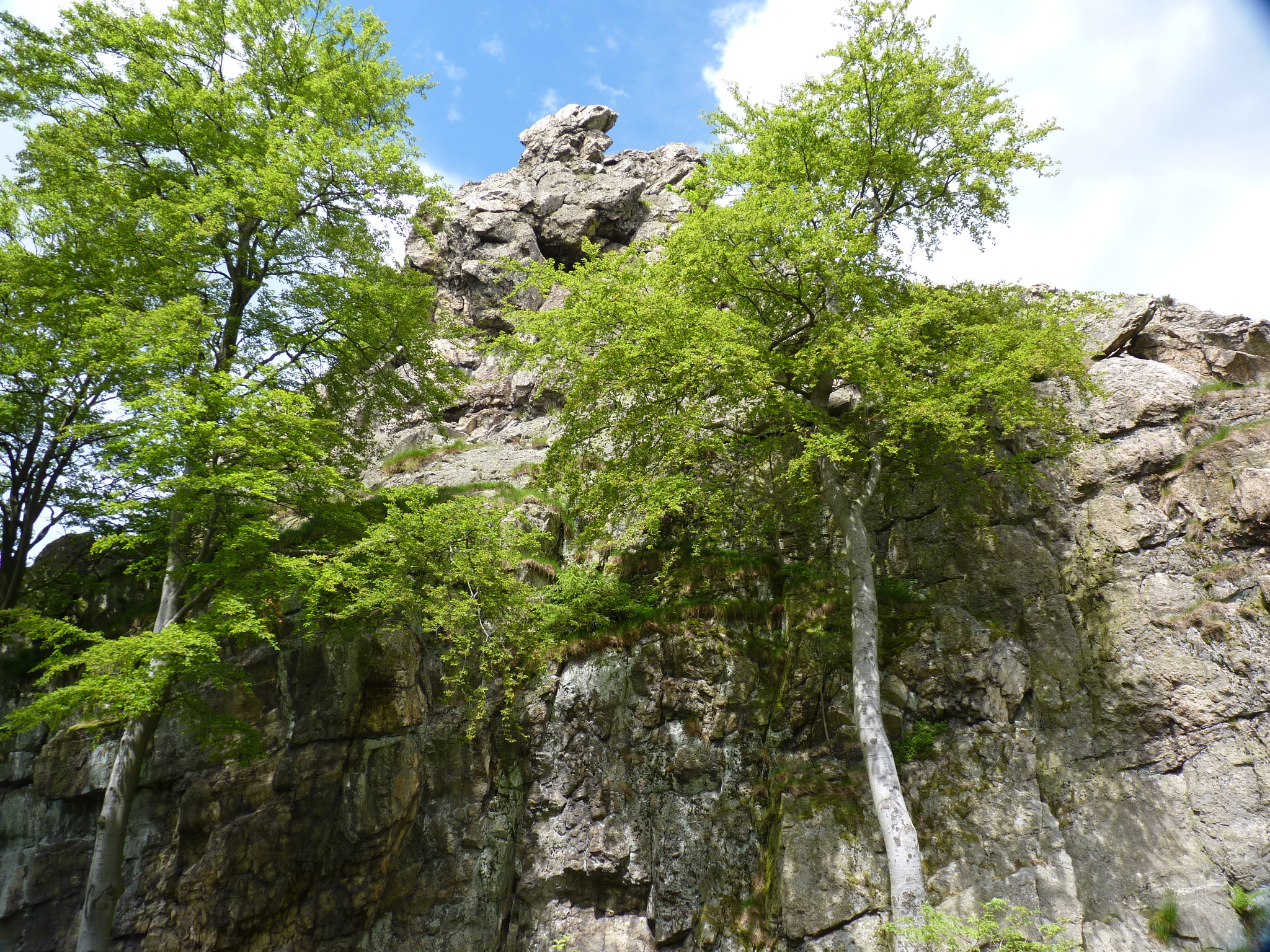 Der Bornstein, bevorzugter Brutplatz der Wanderfalken an den Bruchhauser Steinen